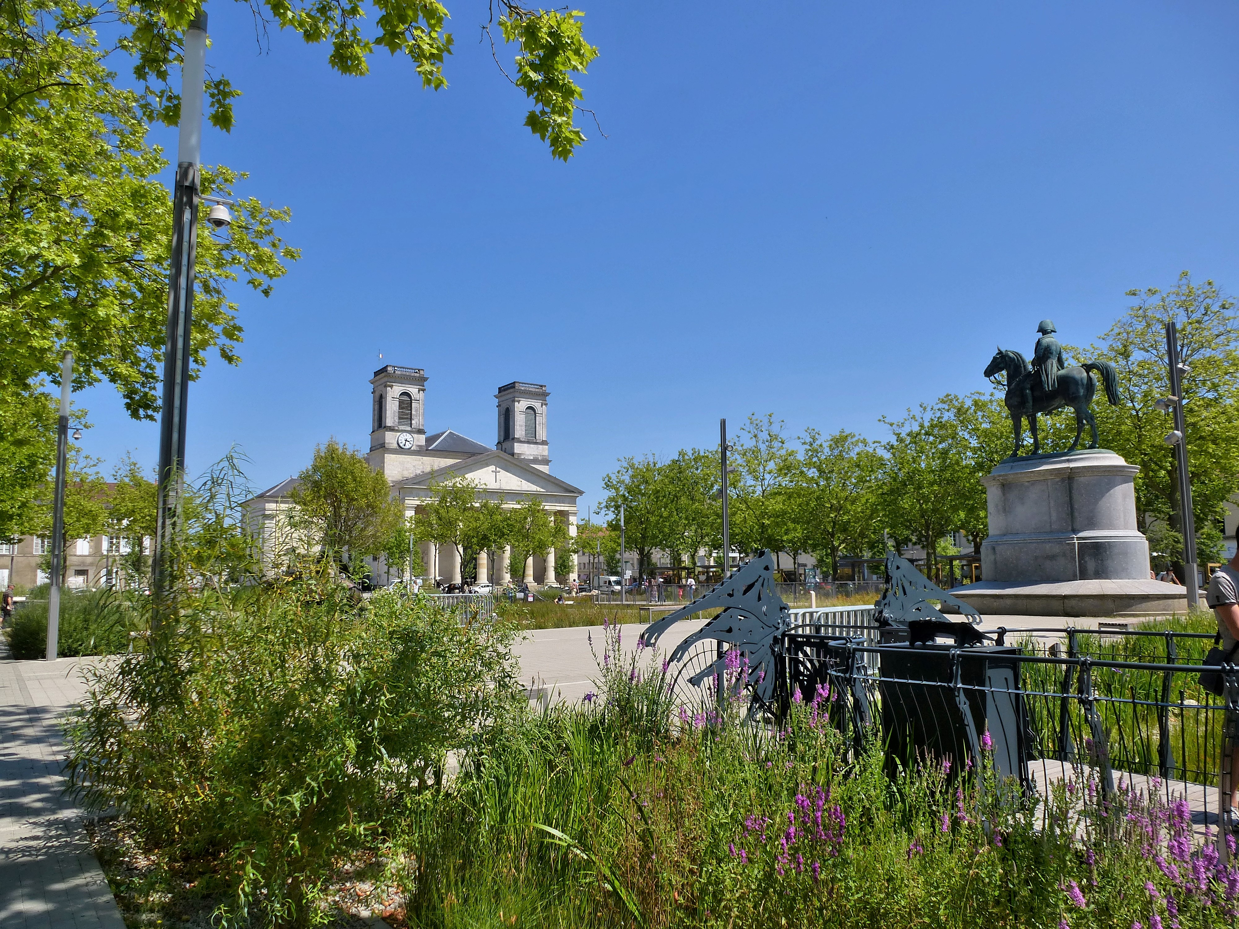 On voit la statue de Napoléon et l'église St Louis